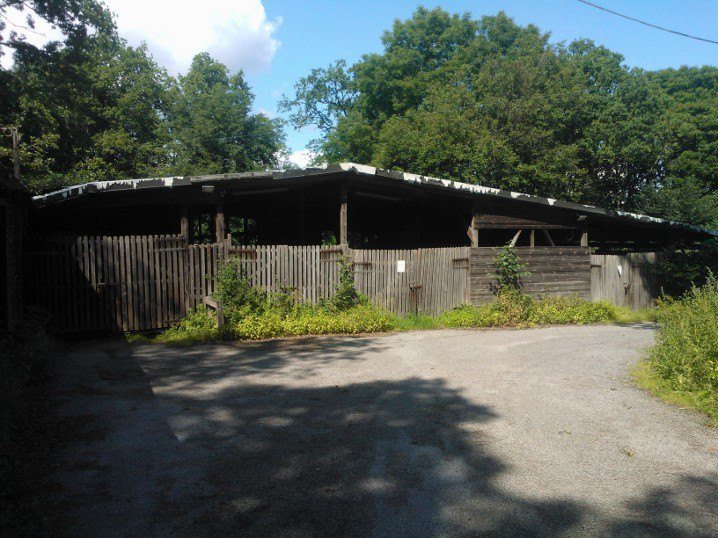 Fårstallet vid Borgen, Norra Djurgården. Användes för Stockholm Stads fårhjord fram till 1991.